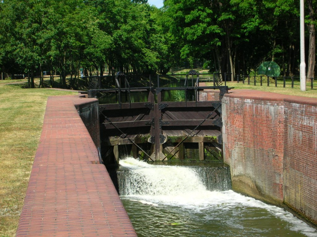 Śluza VI na starym kanale bydgoskim